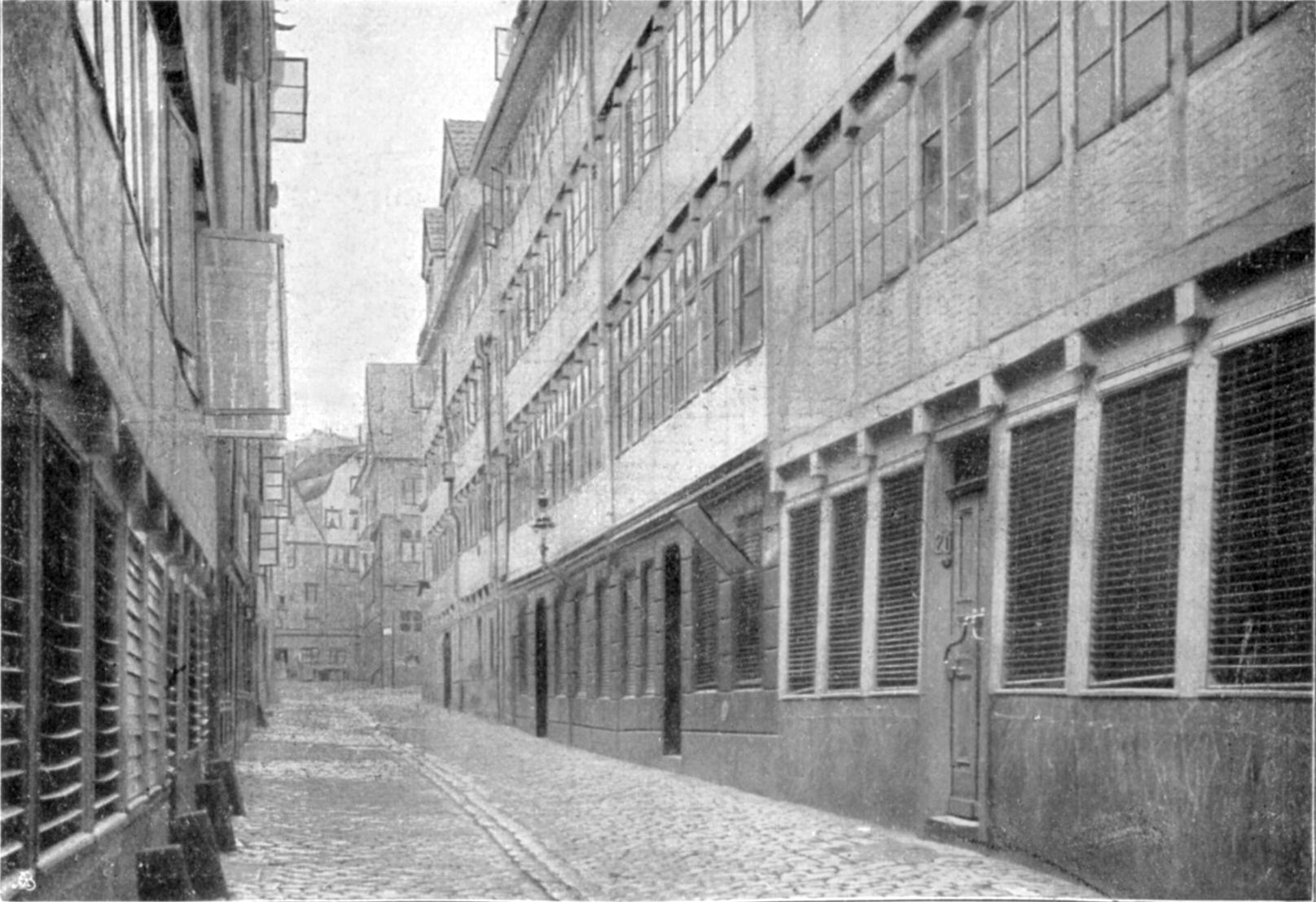 Abb. 182. Straße mit Bordellen in Hamburg. / Dieses Bild zeigt augenscheinlich die Bordellstraße "Ulricusstraße" (zwischen dem Dragonerstall und der Caffamacherreihe), abgerissen in 1959 um Platz zu machen für den Neubau "Unilever-Haus". Ergänzende Beschreibung von Oxfordian Kissuth.